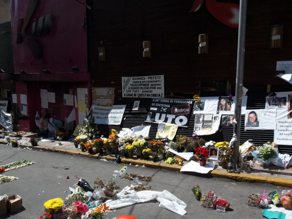 Boate que sofreu incêndio no município de Santa Maria - RS.